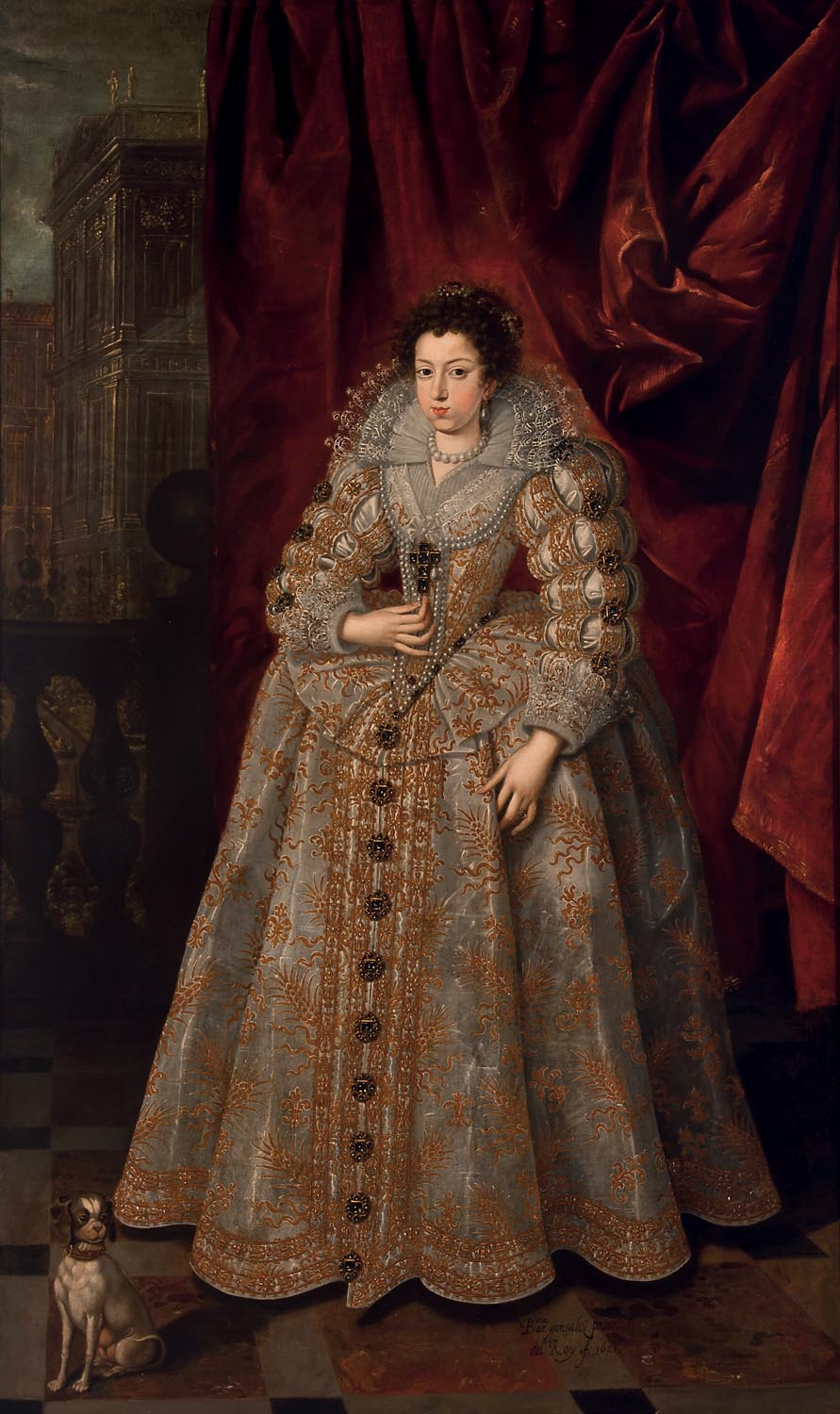 Retrato de la reina Isabel de Borbón (1602-1644), que fue hija del rey Enrique IV de Francia y la primera esposa del rey Felipe IV de España.